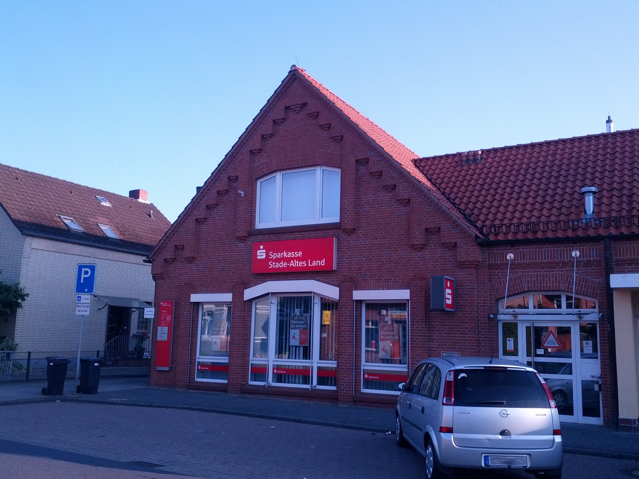 Filiaal von de Spoorkass Stood-Oolland in’n Stoder Stadtdeel Kopenkamp